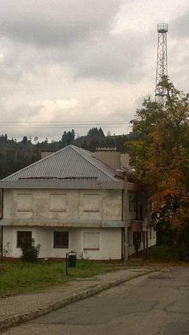 Zwardoń, budynek po byłej siedzibie granicznej placówki kontrolnej Straży Granicznej (SG), od listopada 1995 rok, do 24 sierpnia 2005 roku, na stacji kolejowej w Zwardoniu.